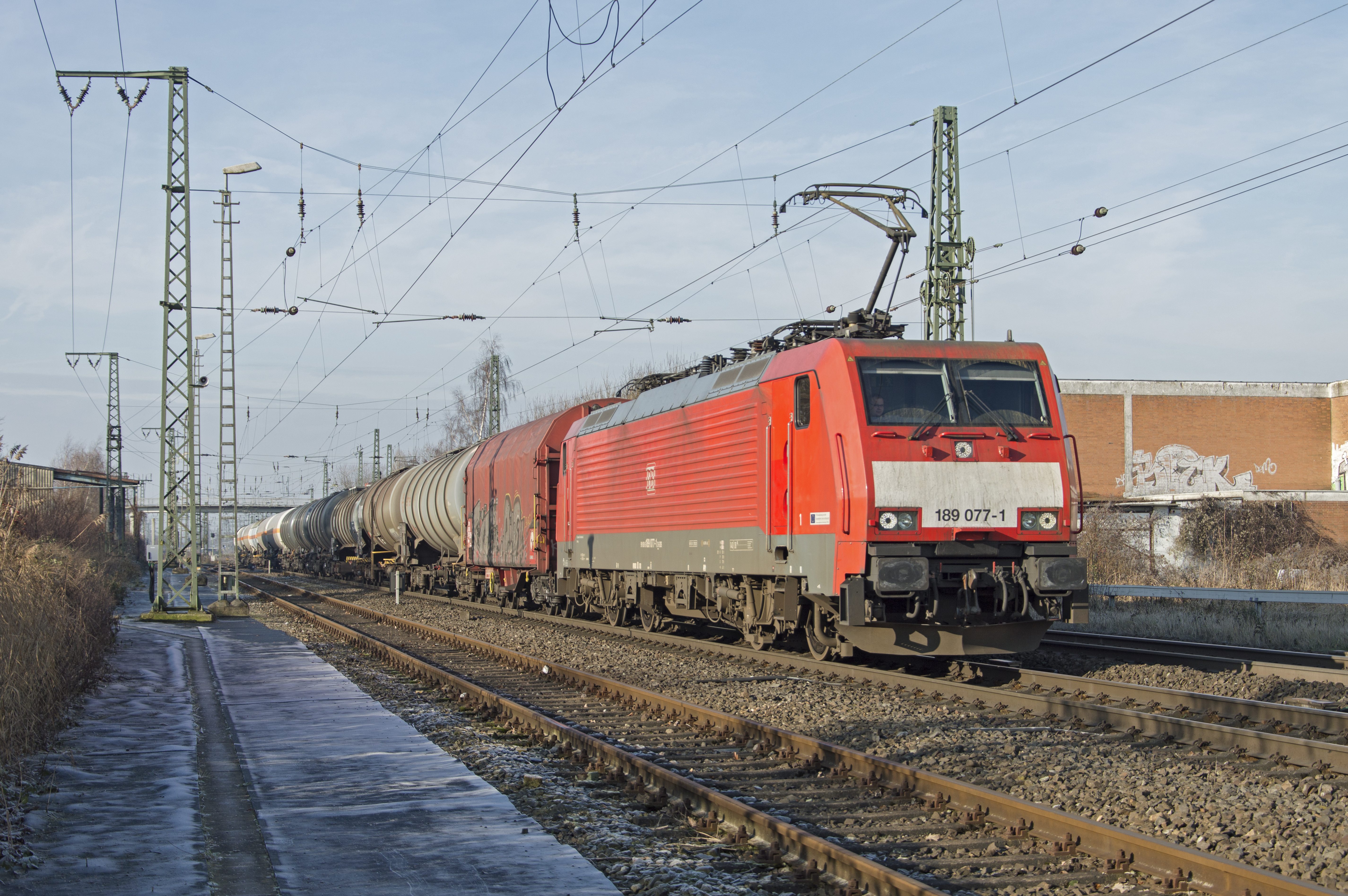 Na de passage van de ICE vertrekt in Emmerich rond het middaguur DB Cargo 189 077 met een keteltrein richting Oberhausen.